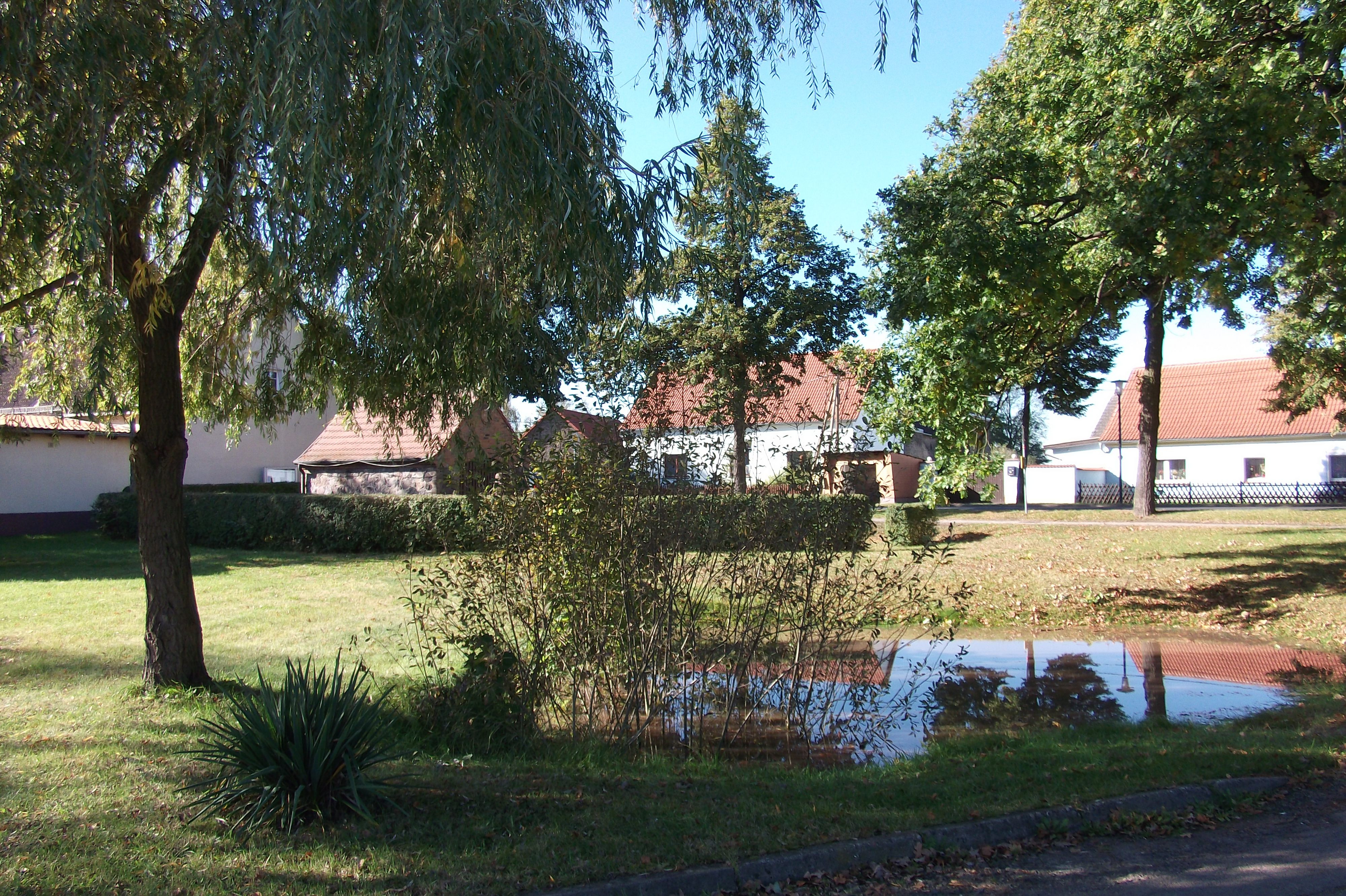 Dorfplatz (Gadsdorfer Straße) in Gadsdorf, Gem. Am Mellensee, Brandenburg, Deutschland